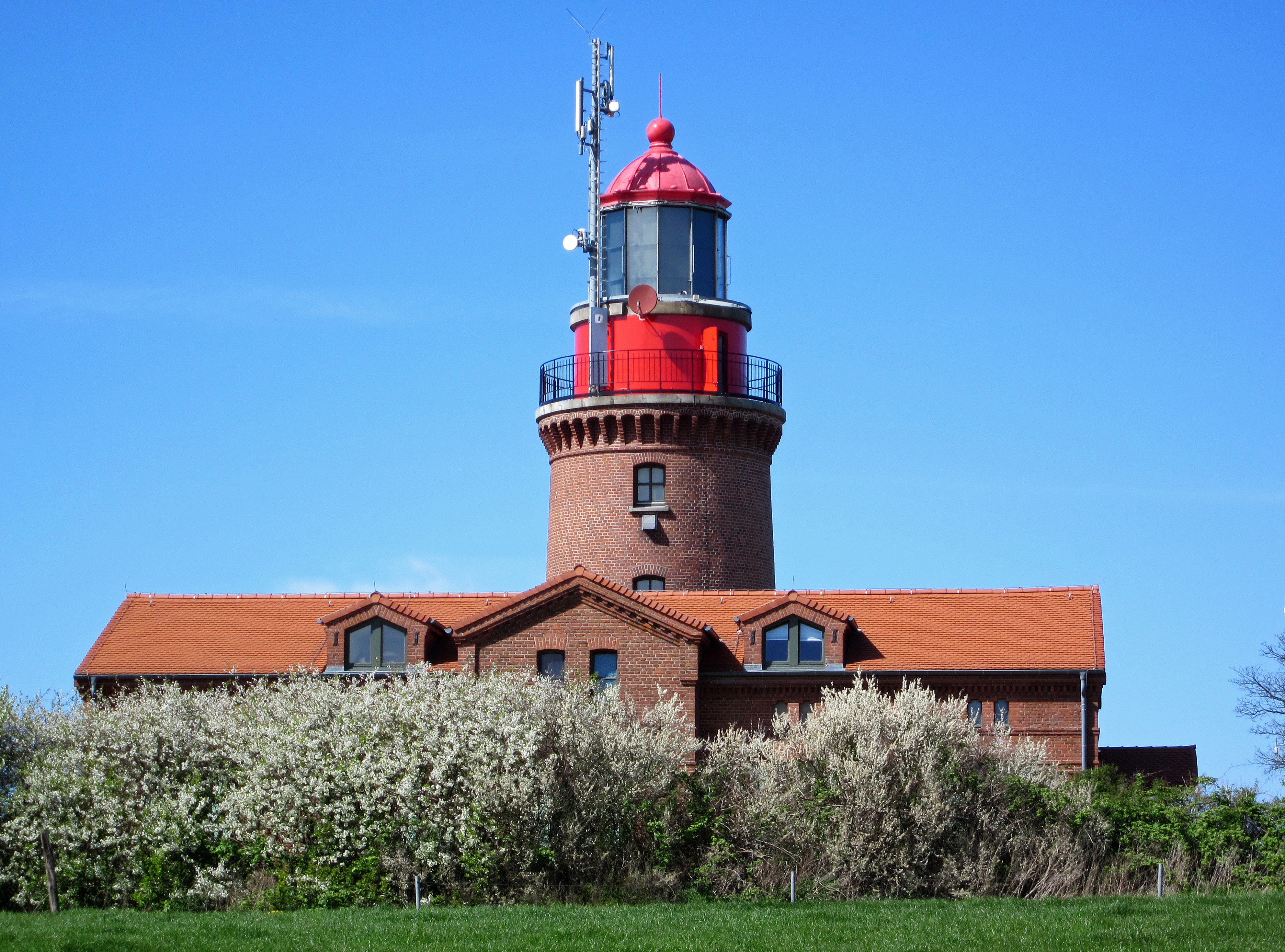 Leuchtturm Bastorf